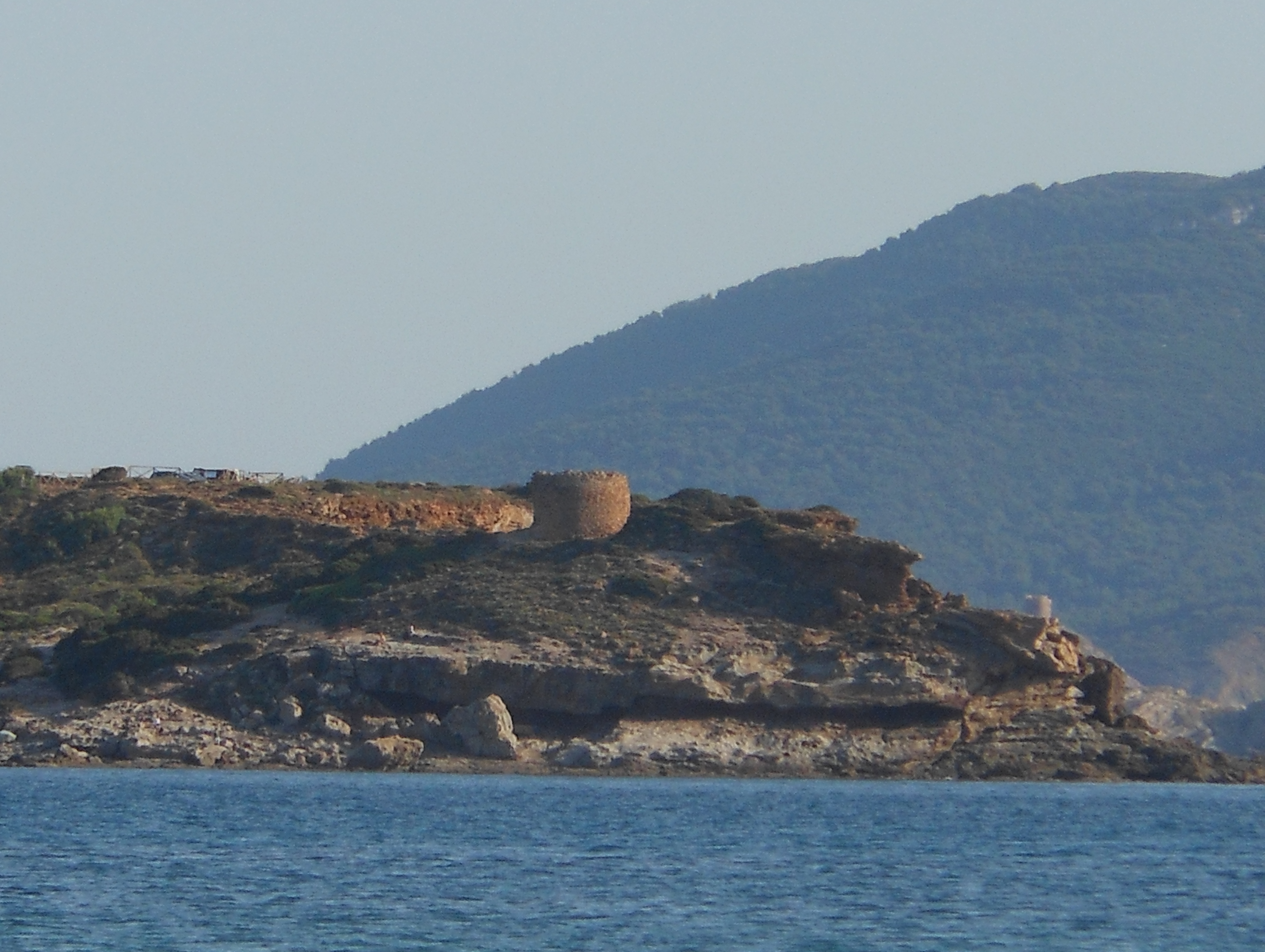 La torre di Bantine Sale in primo piano e dietro la torre del Porticciolo.